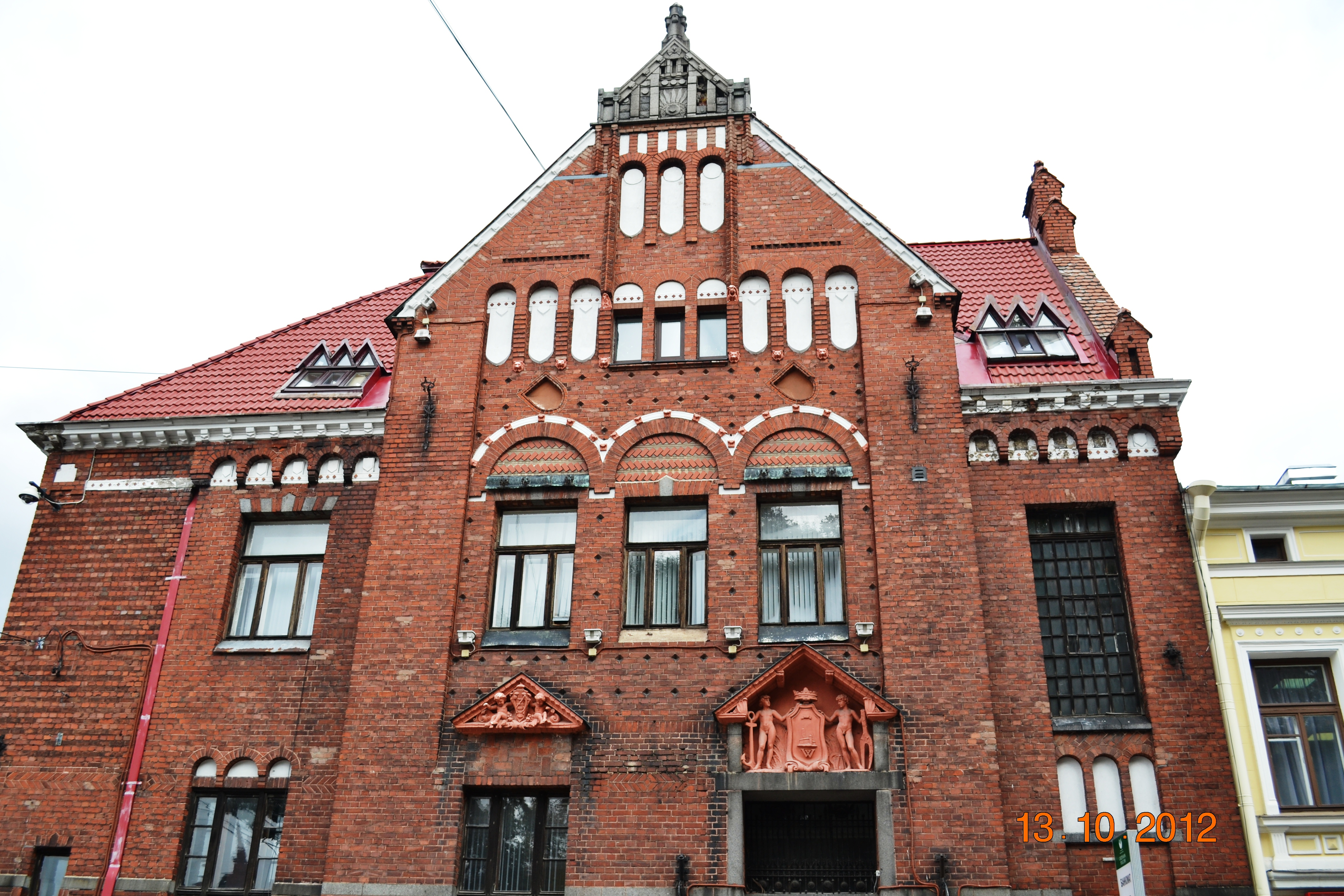 Здание частного банка (Санкт-Петербург и Лен.область, Выборг, ленина пр., 2)